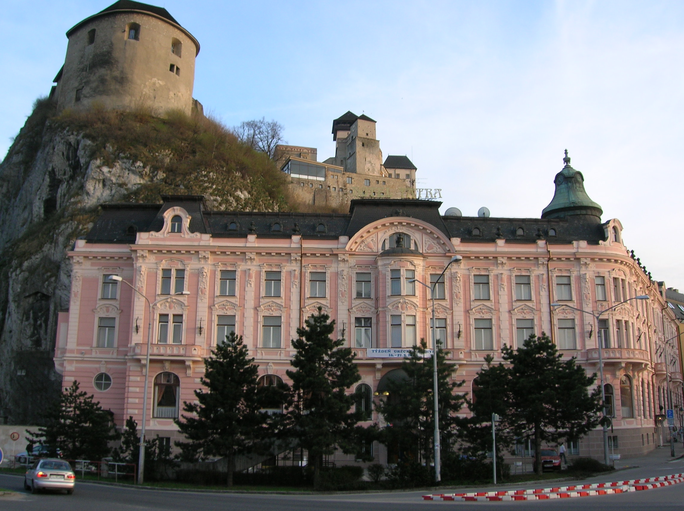 hotel Tatra, Trenčín. pohľad spredu. nad hotelom časť hradu This medium shows the protected monument with the number 309-2214/0 in the Slovak Republic.